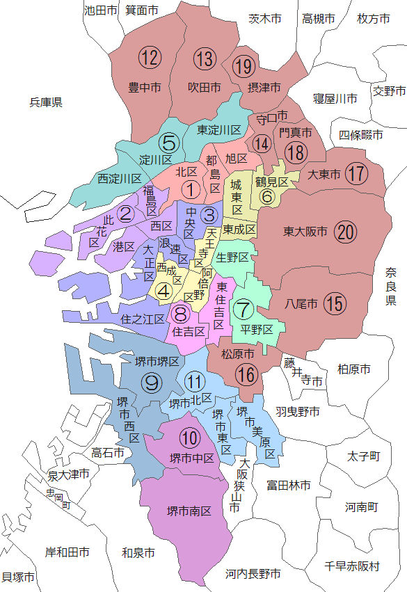 大阪都構想 / File:Osakato24ku koso.pngより作成 / 色調をソフトにし市区町村名を追加